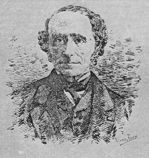 Jean-Pierre Duvoisin est un écrivain et traducteur basque labourdin né en 1810 à Ainhoa et mort en 1891 à CiboureEuskara: Joan Piarres Duvoisin Lapurdiko euskal idazle eta itzutzaile zena Ainhoa sortu zen 1810ean eta 1891ean hil zen Ziburun